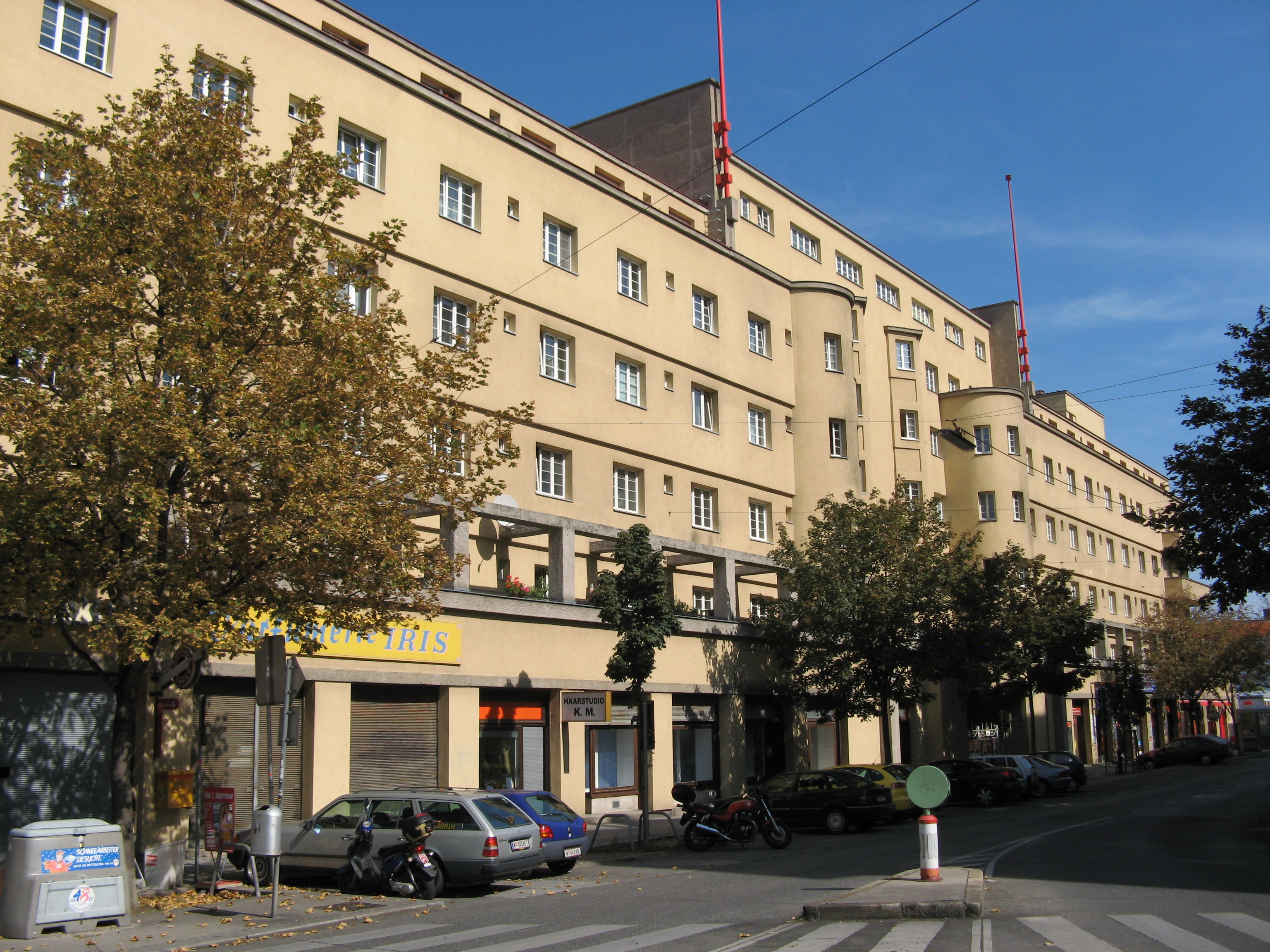 Wohnhausanlage Bebelhof (1925/26) von Karl Ehn in Wien-Meidling